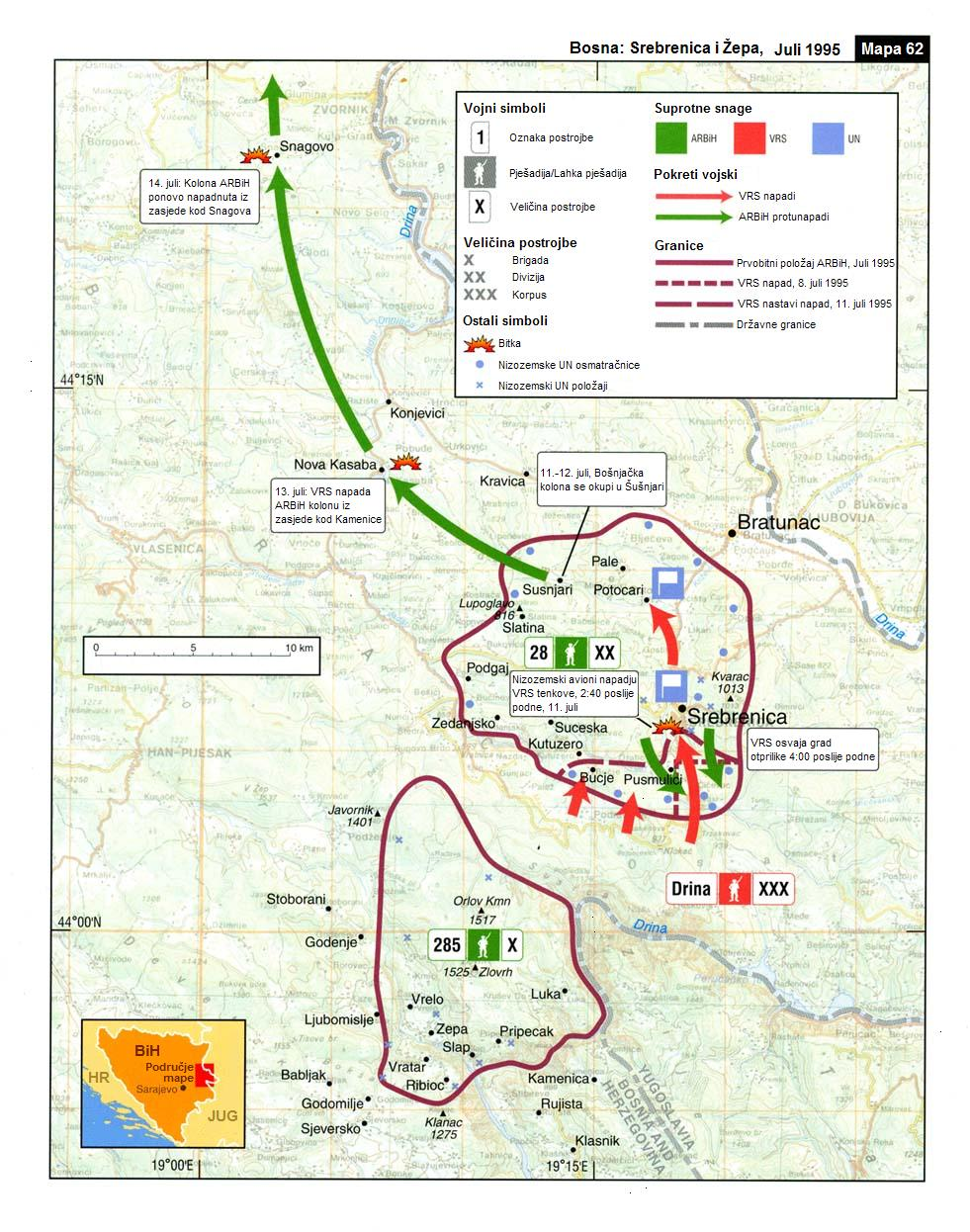 Karta vojnih operacija u julu 1995. izvršenih u Srebrenici